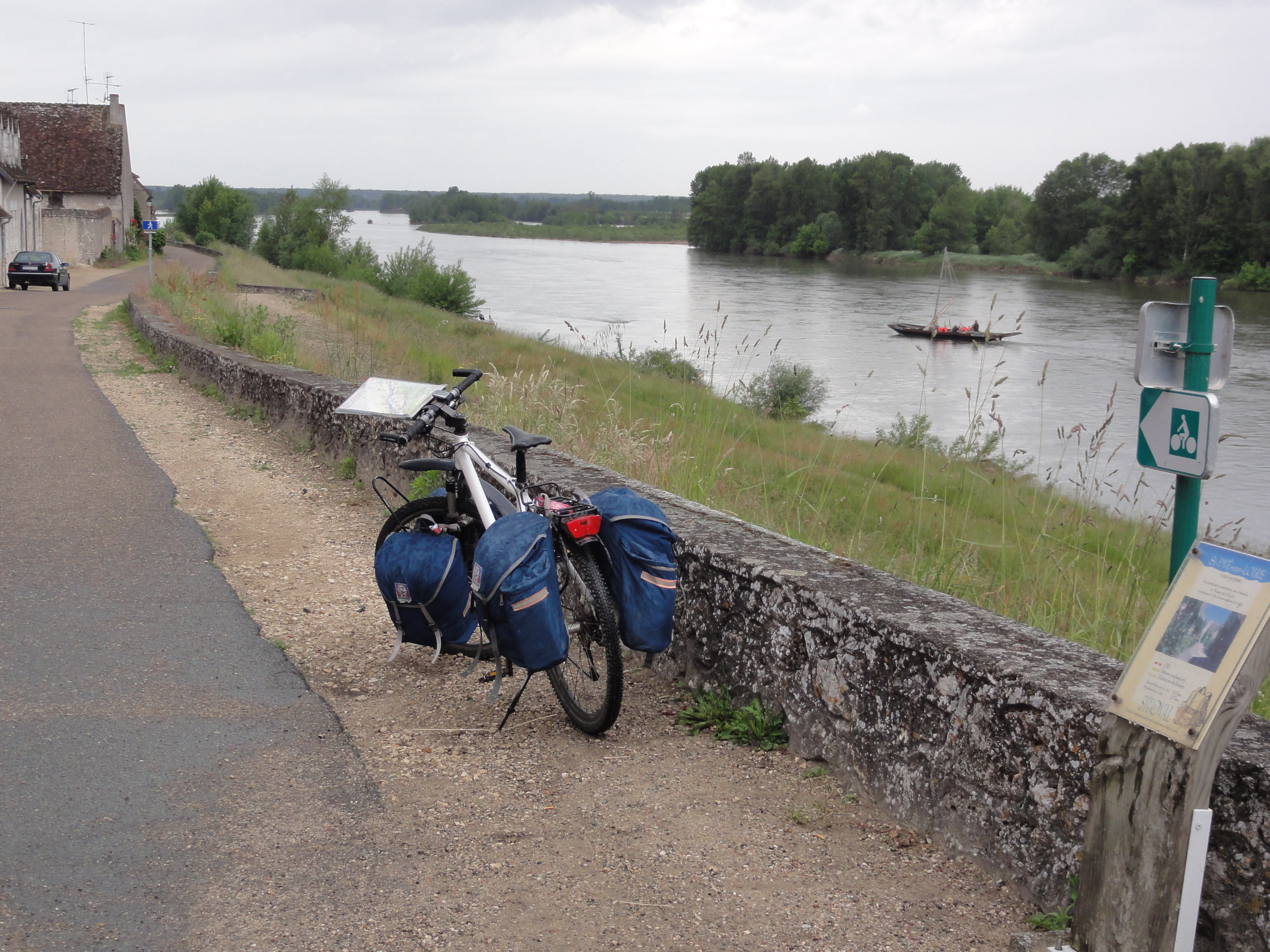 Saint-Dyé-sur-Loire (Loir-et-Cher) La Loire à velo